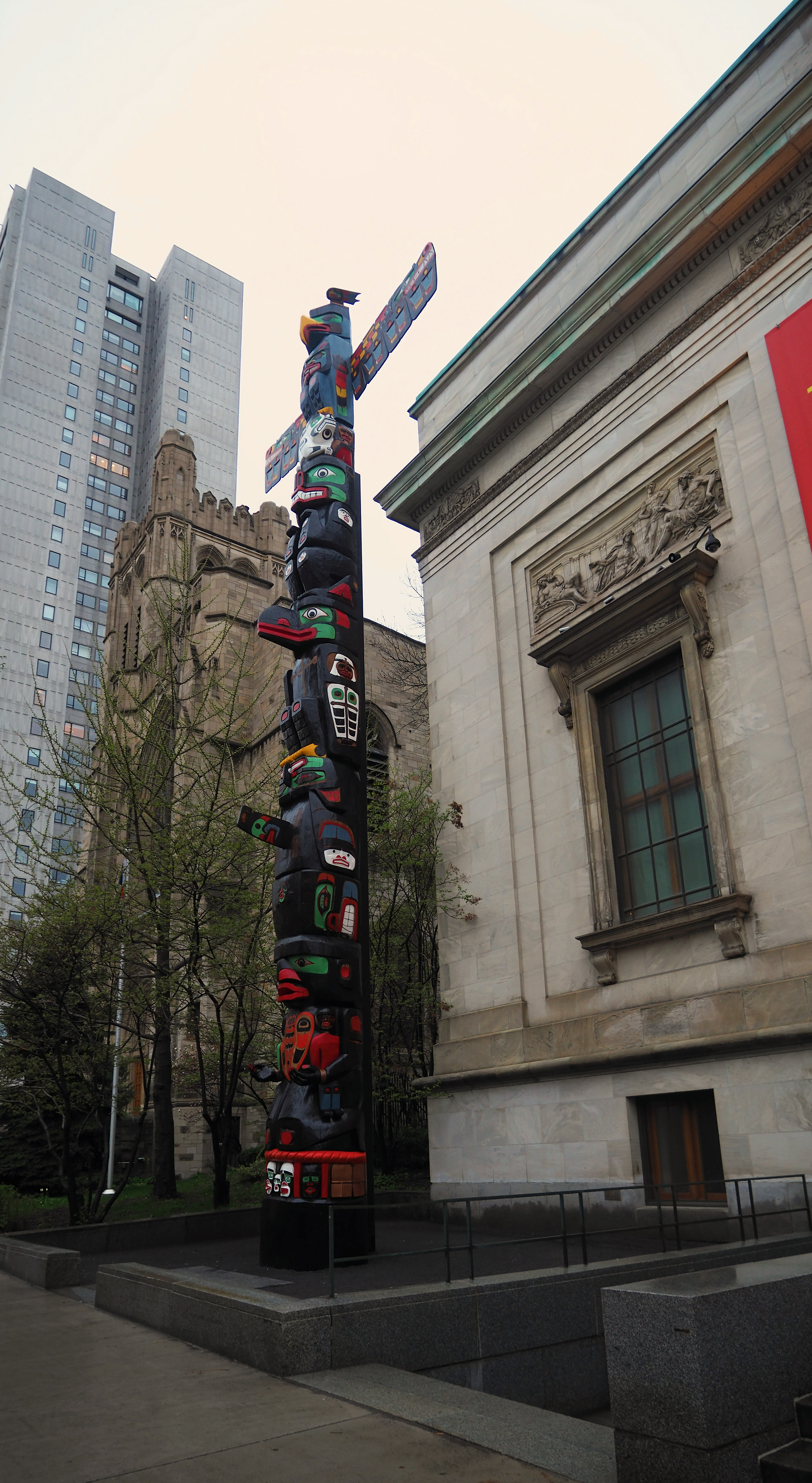 Ce totem a été créé par l’artiste Charles Joseph de la nation kwakiutl de la Colombie-Britannique. Sa stature de plus de 21 mètres impose devant le pavillon Michal et Renata Hornstein du Musée des beaux-arts de Montréal (MBAM). Le dévoilement eut lieu le 3 mai 2017, dans le cadre du 375e anniversaire de Montréal. Nommé Mât totémique des pensionnats, l'œuvre fait partie d'un parcours de l’exposition La Balade de la Paix – un musée à ciel ouvert. Il rappelle les enfants autochtones qui ont été retirés de leurs familles et placés dans des pensionnats durant la période de 1820 jusqu’en 1996, une situation que l'auteur a lui-même vécue.